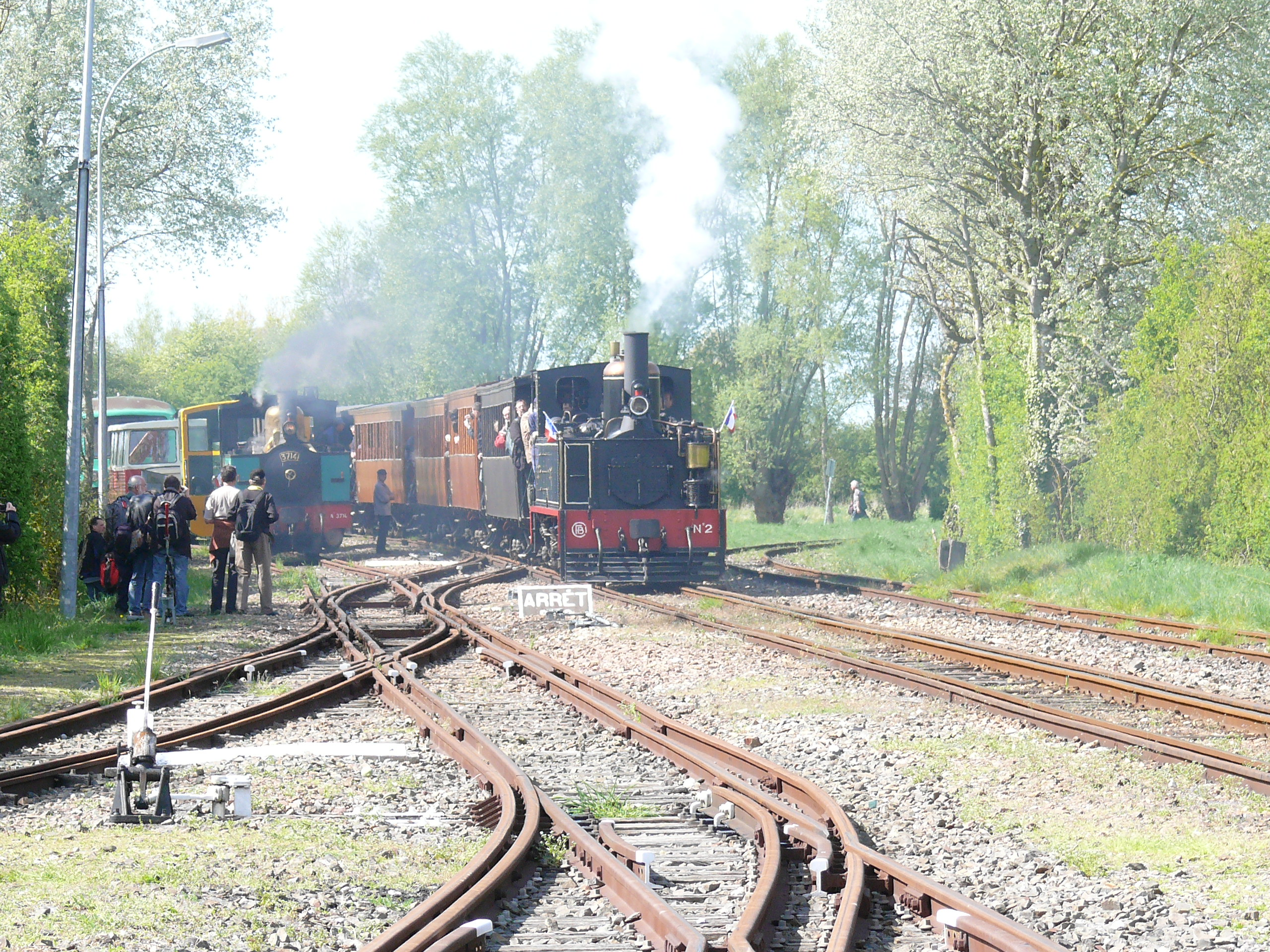 Avant gare de Noyelles du Chemin de fer de la baie de Somme avec ses voies métriques et voies à double écartement (normale et métrique)A gauche et au centre, voies marchandises des installations de transbordement, puis voie vers Saint-Valery (double écartement) et enfin, voie métrique vers Le Crotoy.Sur la voie de tiroir à droite, la 031T Buffaud-Robatel N°3714 et la draisine du CFBS, et sur la voie de Saint-Valery, rame tractée par la 130T Cail N°2